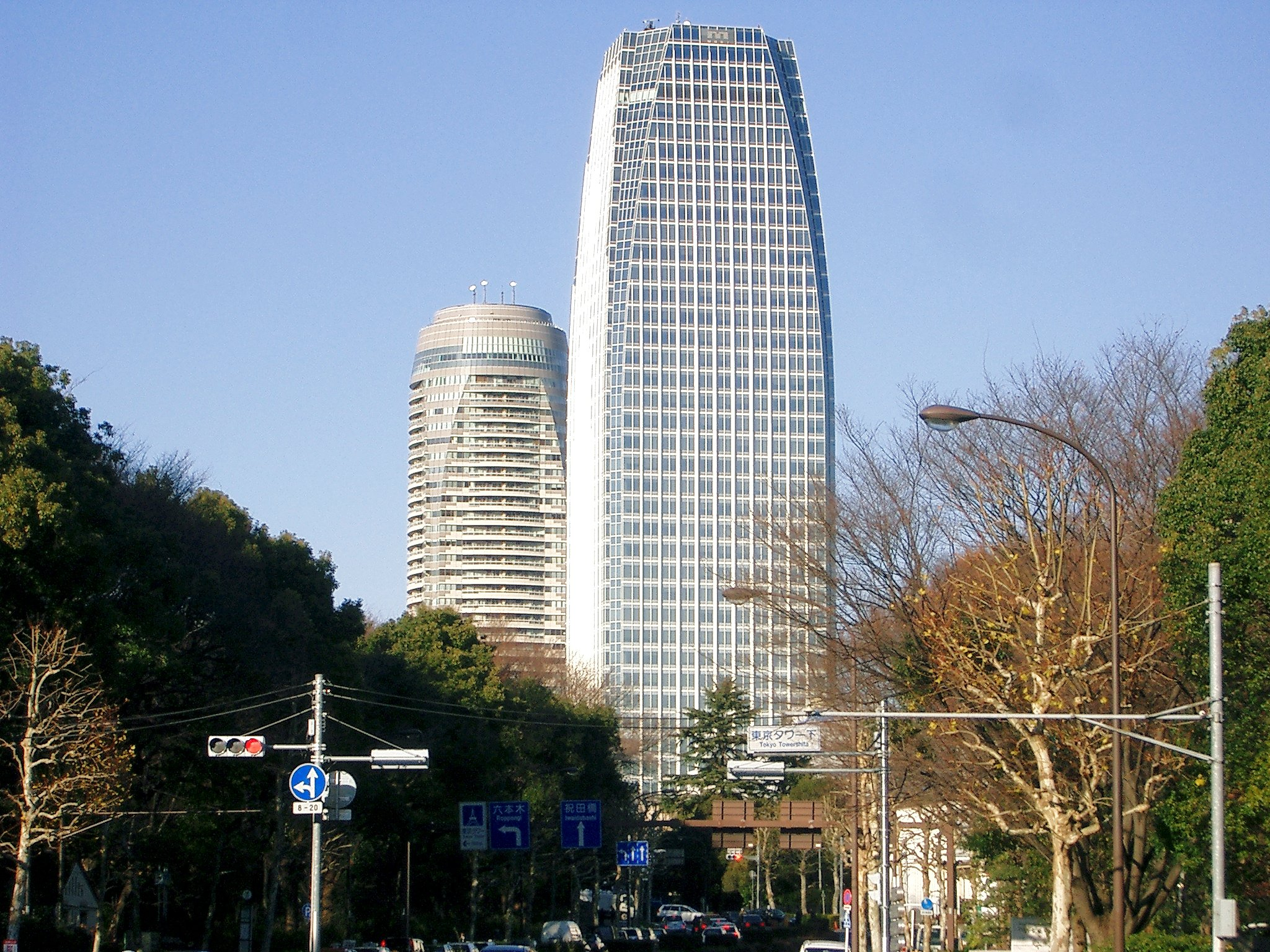 Atago Green Hills 愛宕グリーンヒルズ